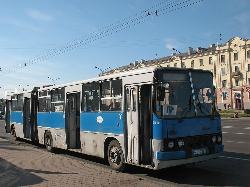 Ікарус-280 у Мінску.